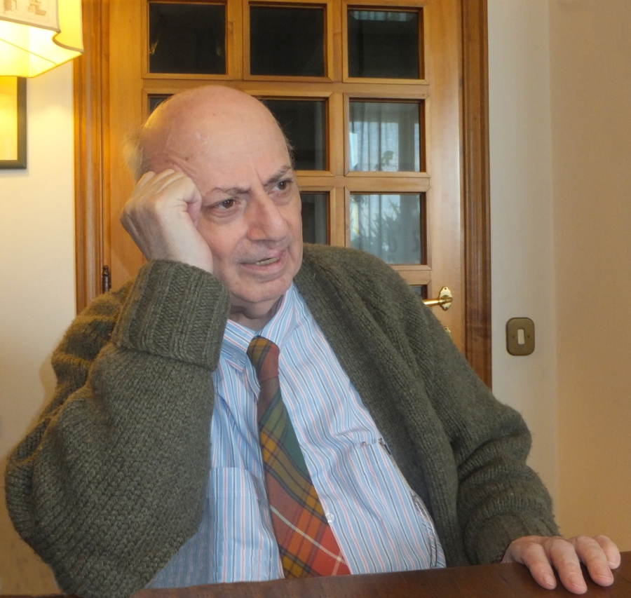 Carlo Lapucci Alessio Bandini, opera propria, licenza d'uso cc-by-sa-4.0